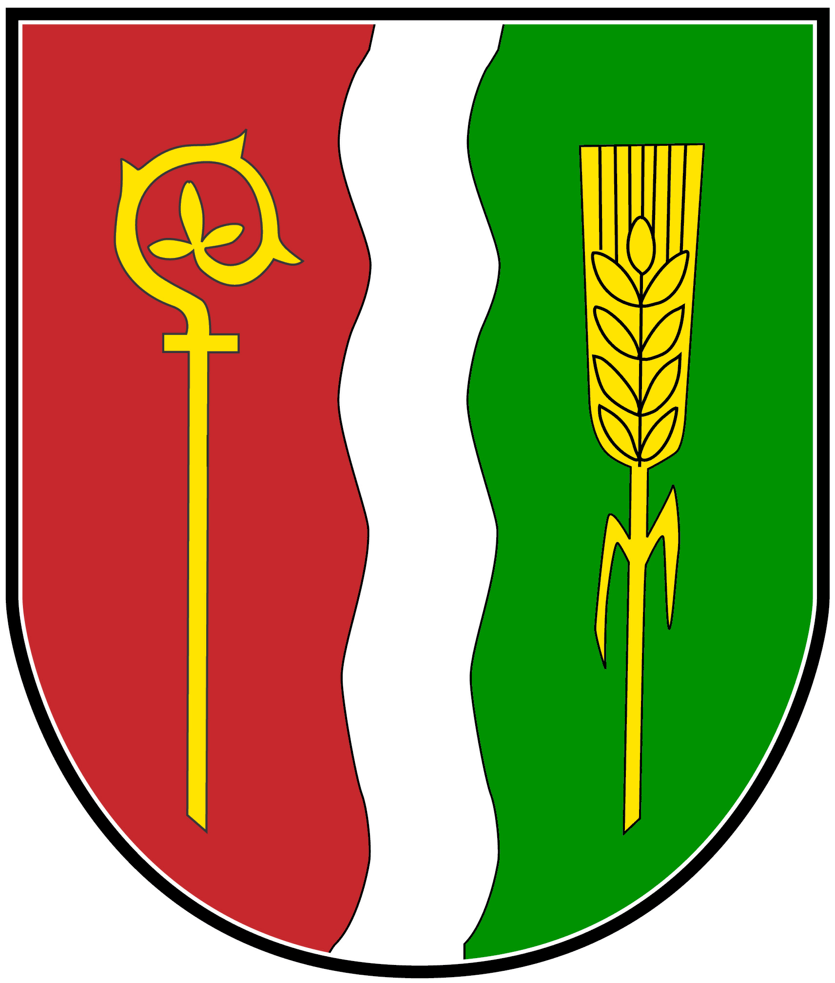 Wappen der Ortsgemeinde Trassem